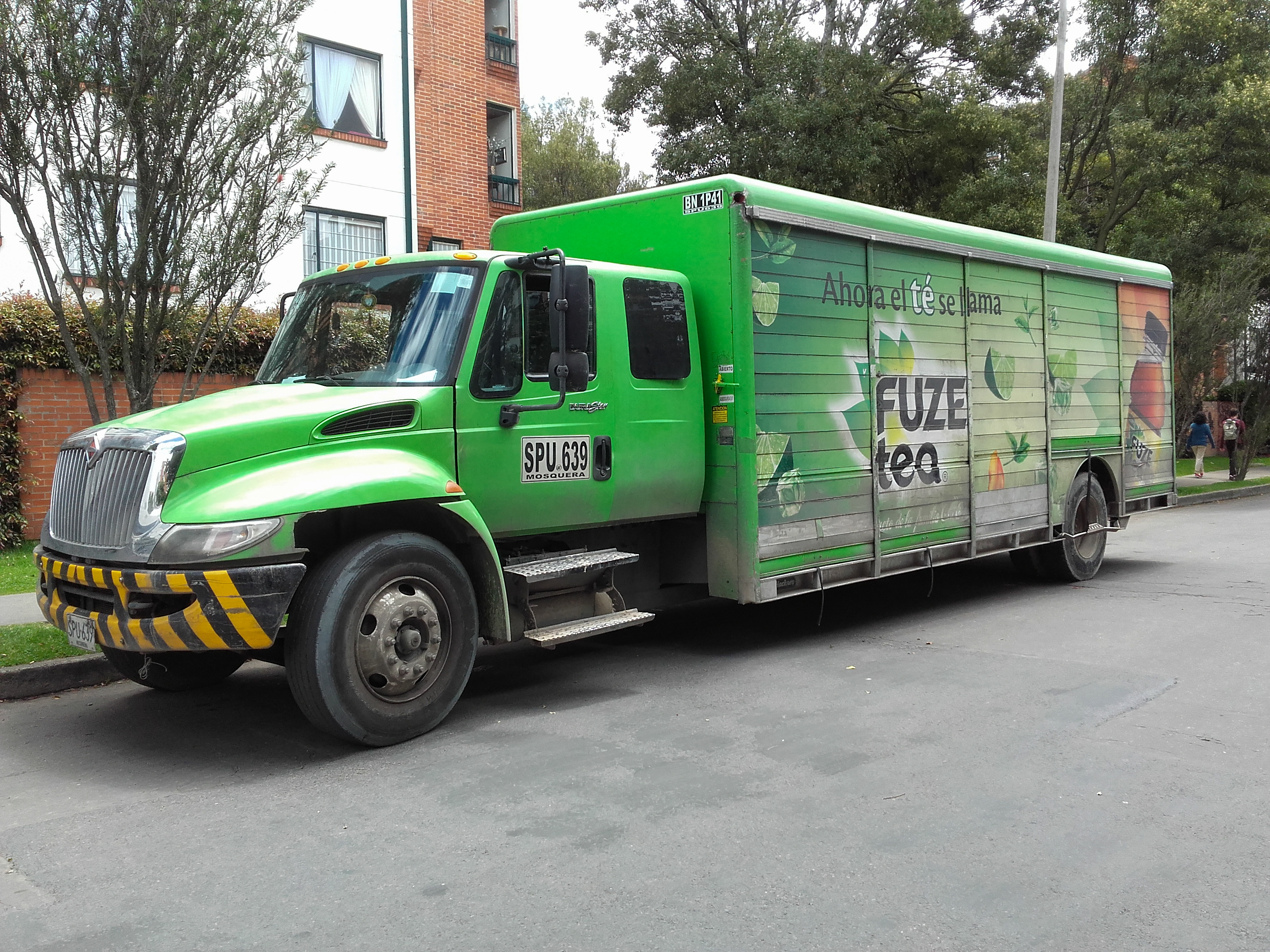 ndndndndn